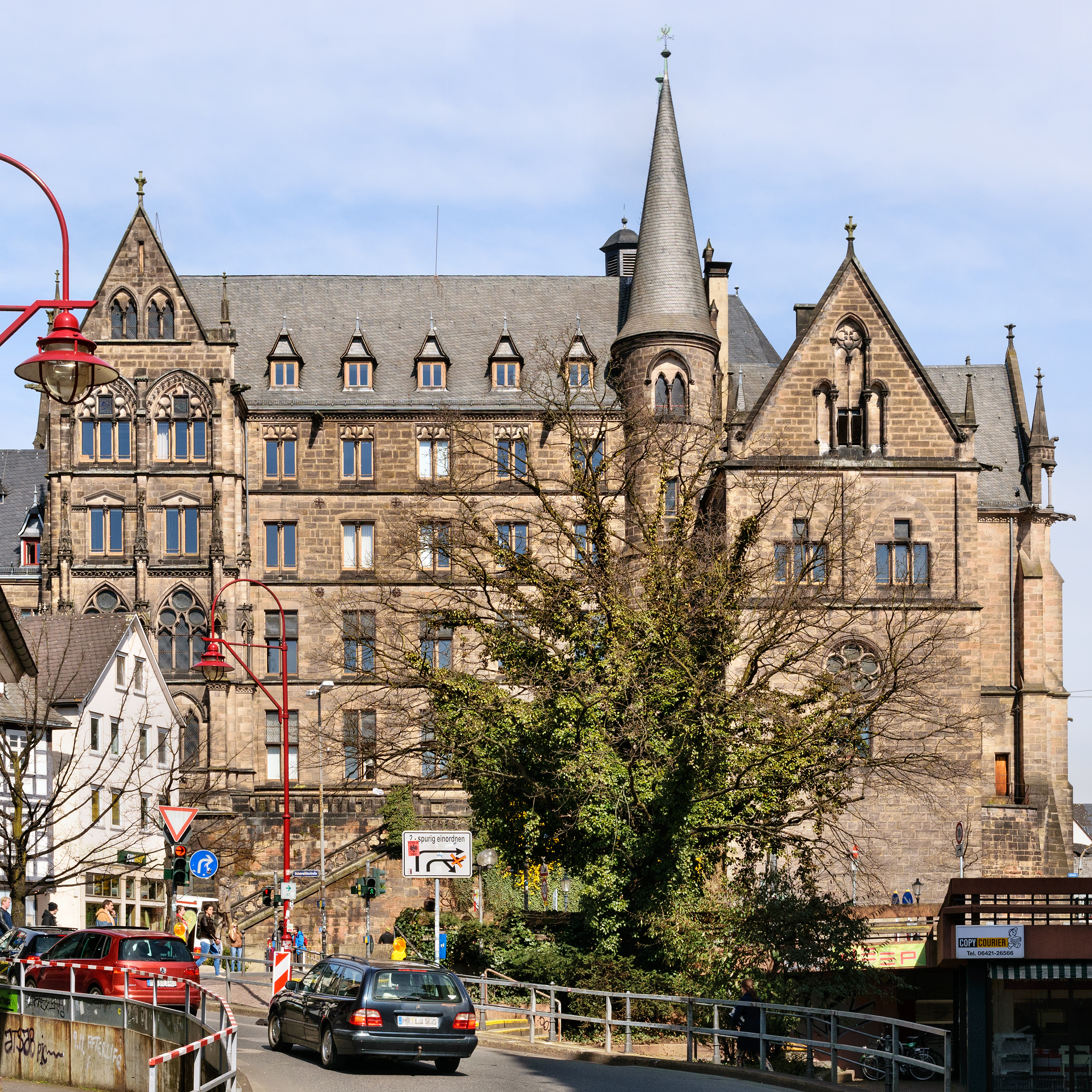 Die Alte Universität in Marburg aus der Straße Am Grün